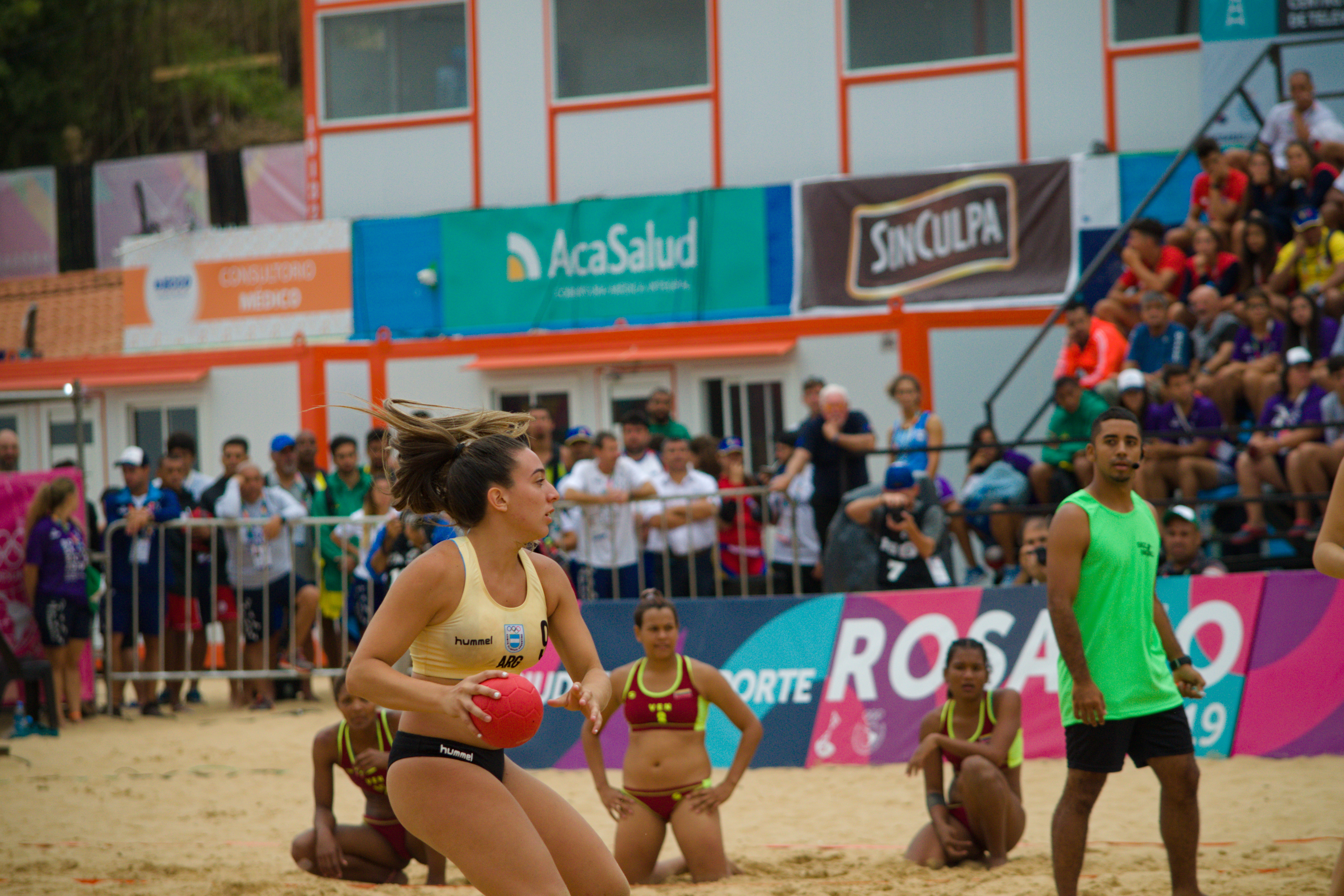 Partido de la semi-final femenina de handball entre Argentina y Venezuela en los Juegos Suramericanos de Playa 2019